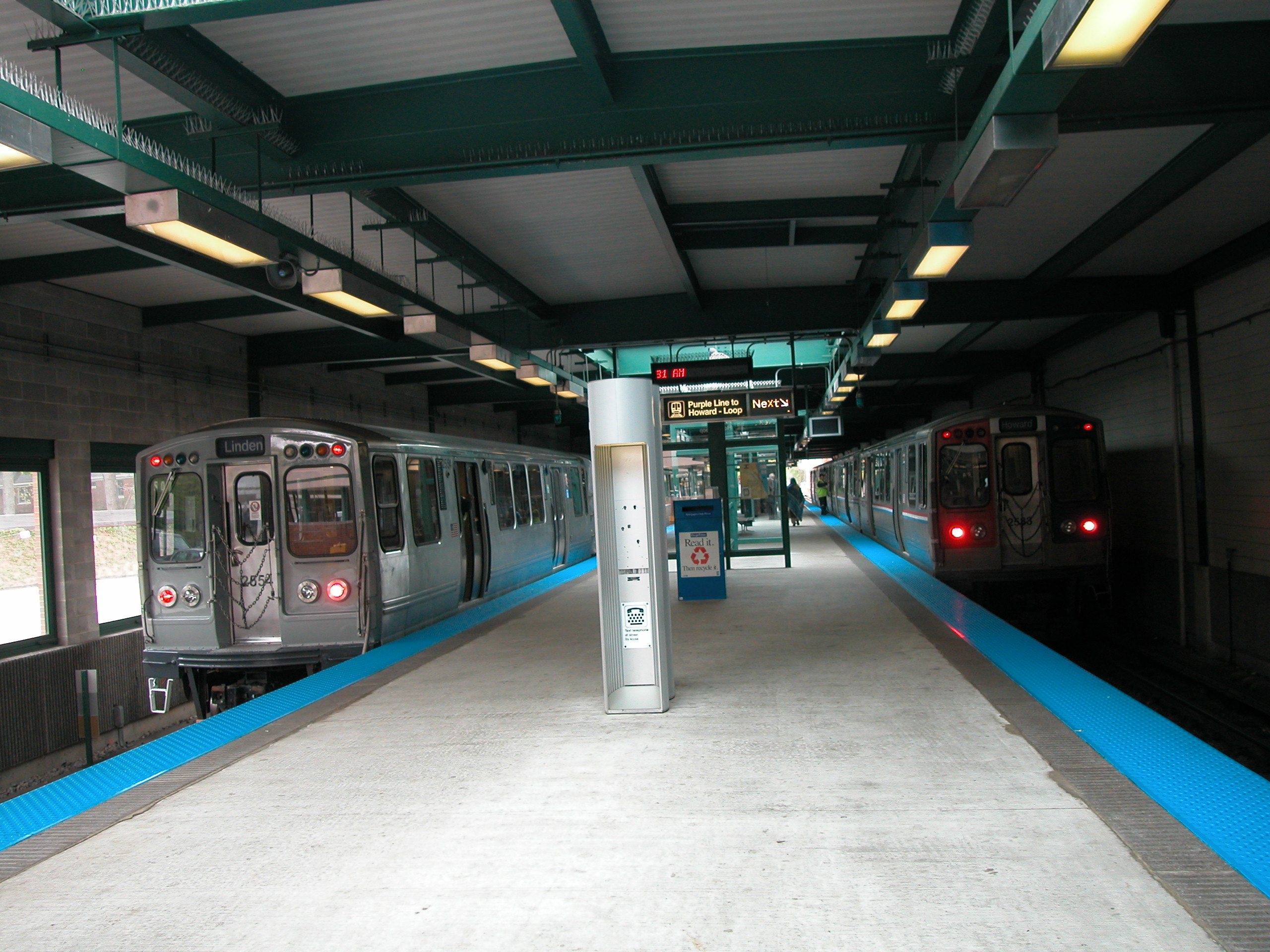 20050513 17 CTA L @ Linden Ave.